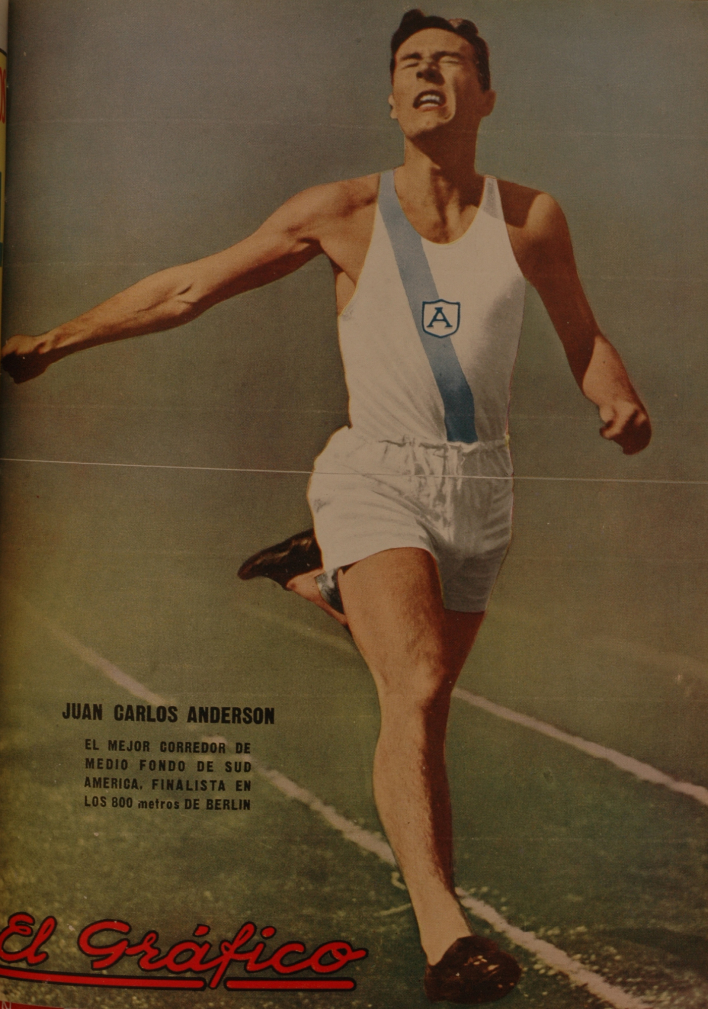 El Grafico del 19 de Septiembre de 1936. Edicion 897